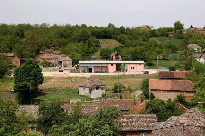 Село Ландол